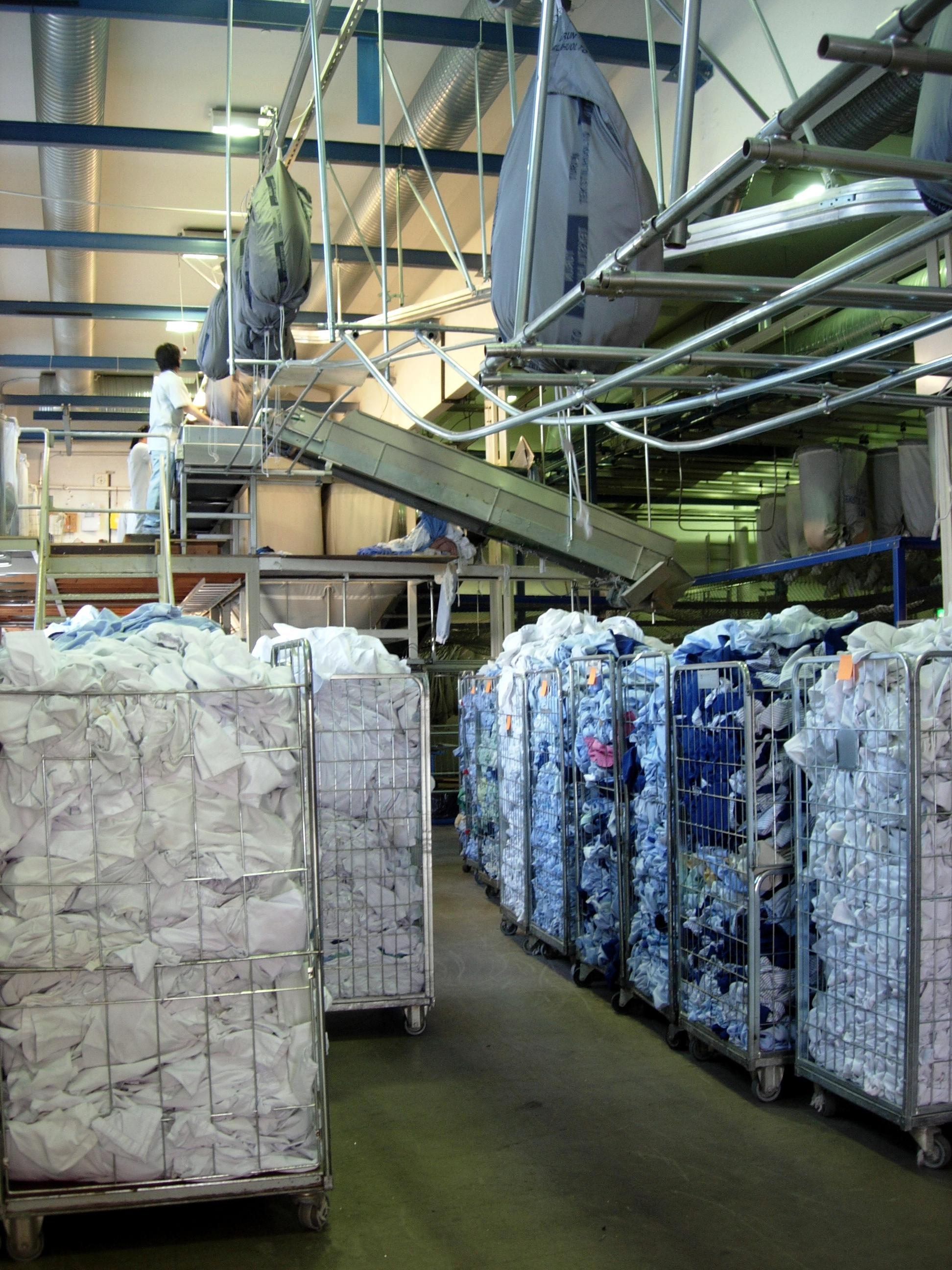 Kuvan etulaidassa ylhäällä olevat säkit kulkevat kiskoa pitkin vasemmalla näkyvään lajittelupisteeseen. Lajiteltu pyykki roikkuu säkeissä oikealla takana. Kullekin pyykkilajille on oma kiskonsa.